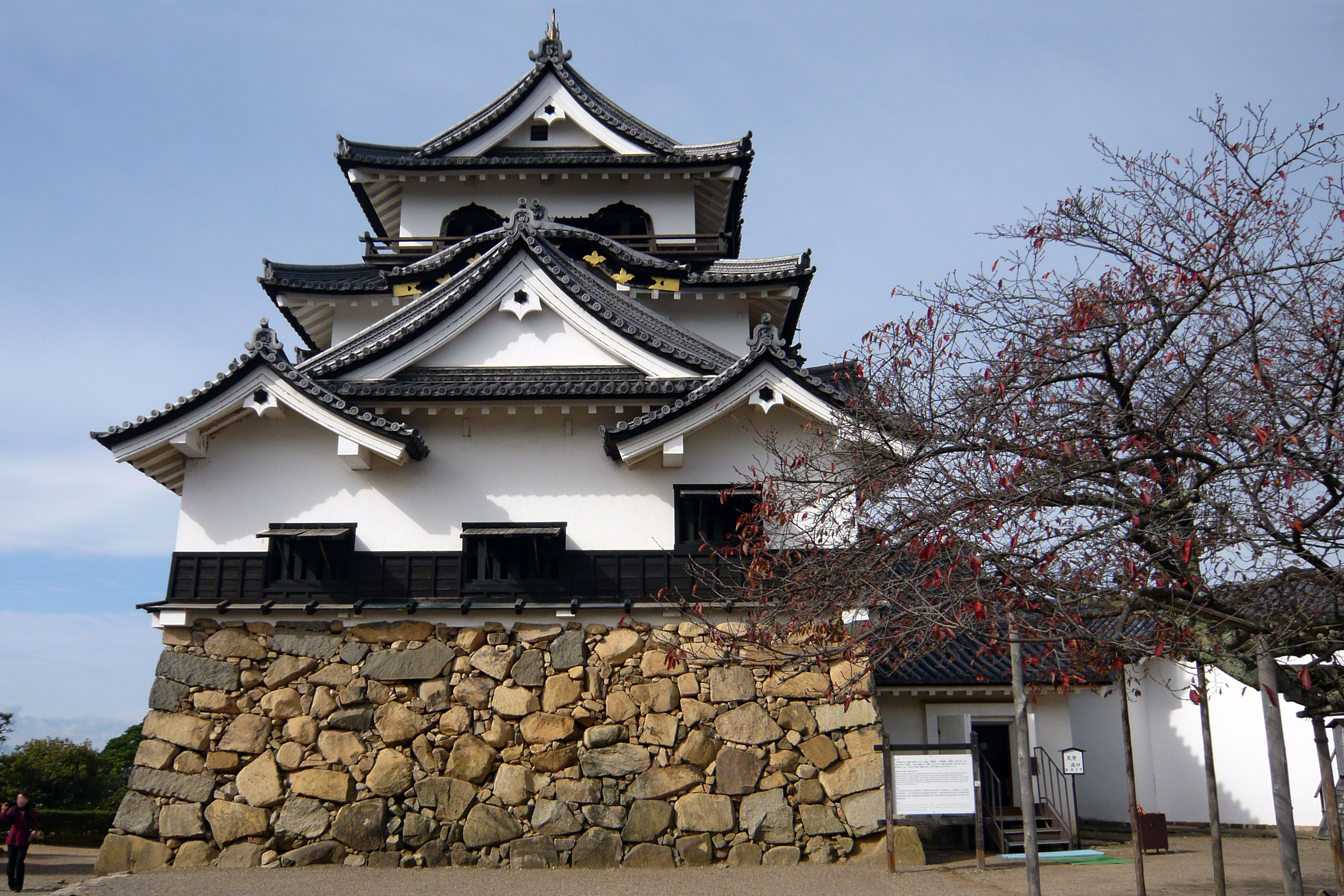 Hikone-jo (彦根城), Hikone, Shiga prefecture, Japan